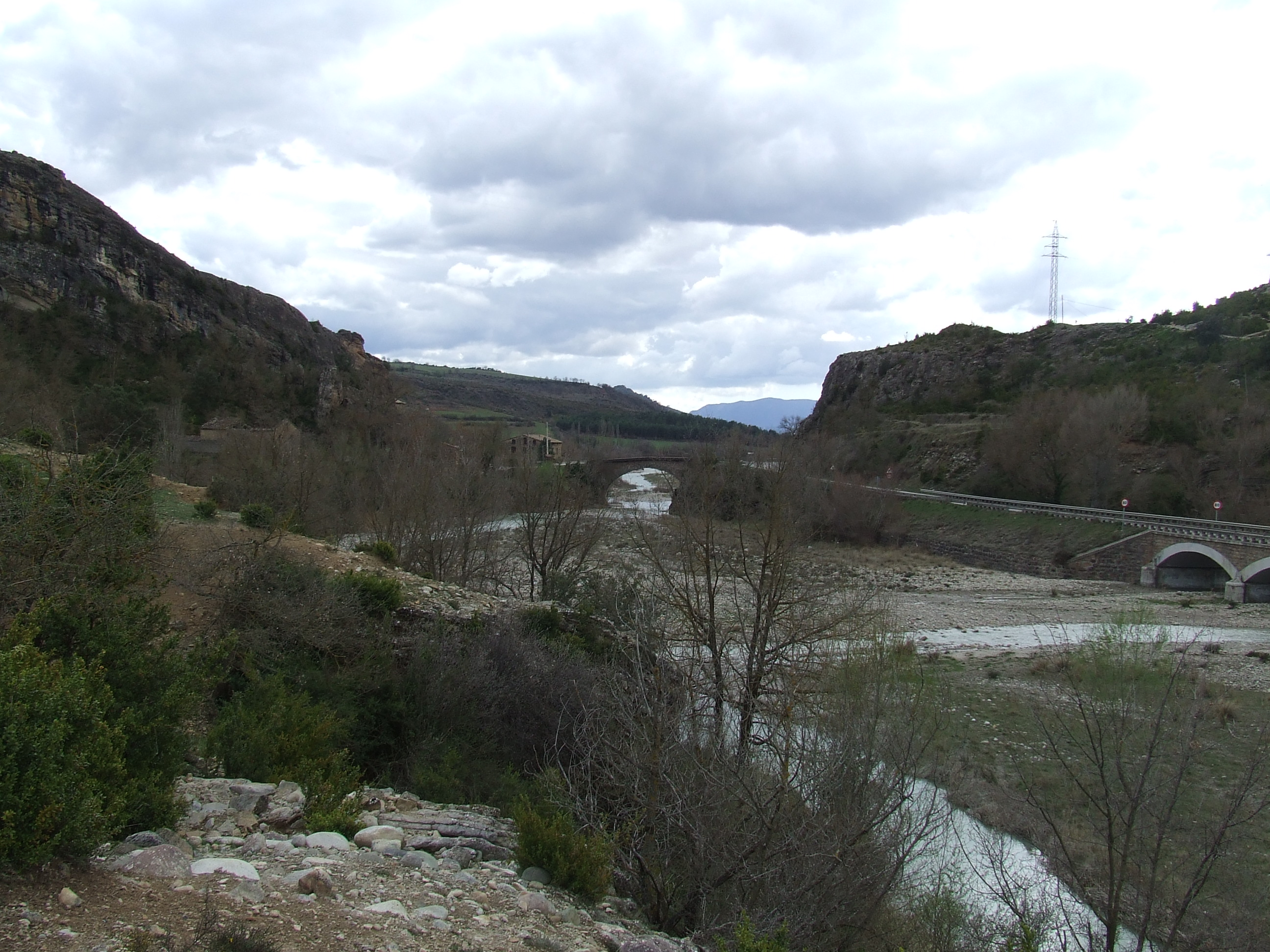 El pont que dóna nom al Pont d'Orrit, damunt la Noguera Ribagorçana (Tremp, Pallars Jussà - Areny de Noguera, Alta Ribagorça).